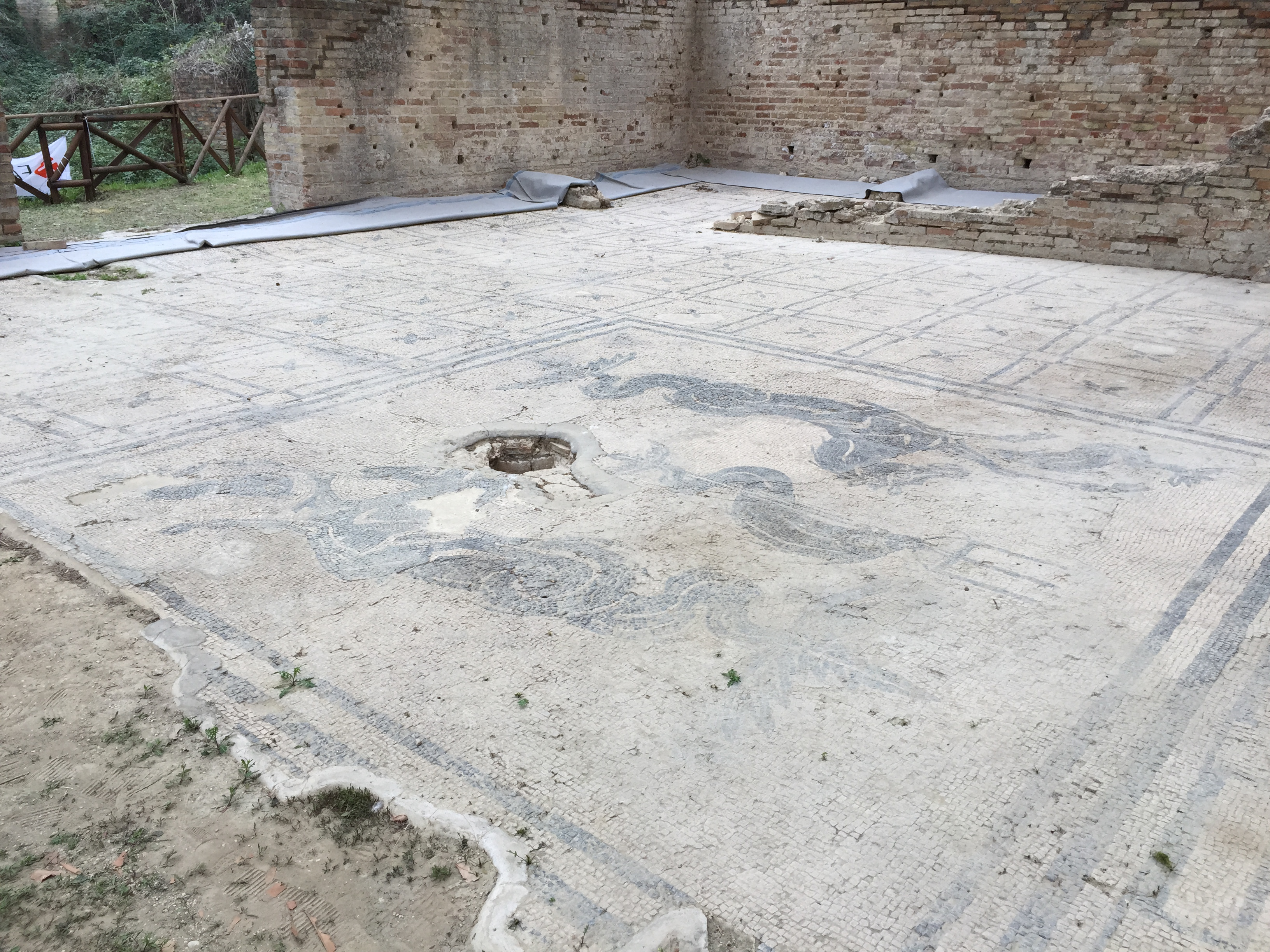 Mosaici dell'atrio delle terme romane dell'antica Teate Marrucinorum